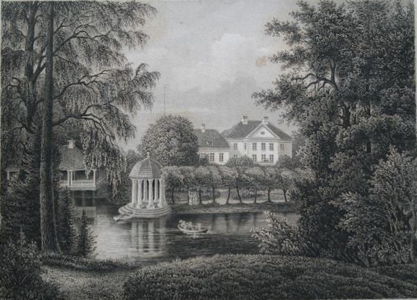 Palmse mõis, terasgravüür